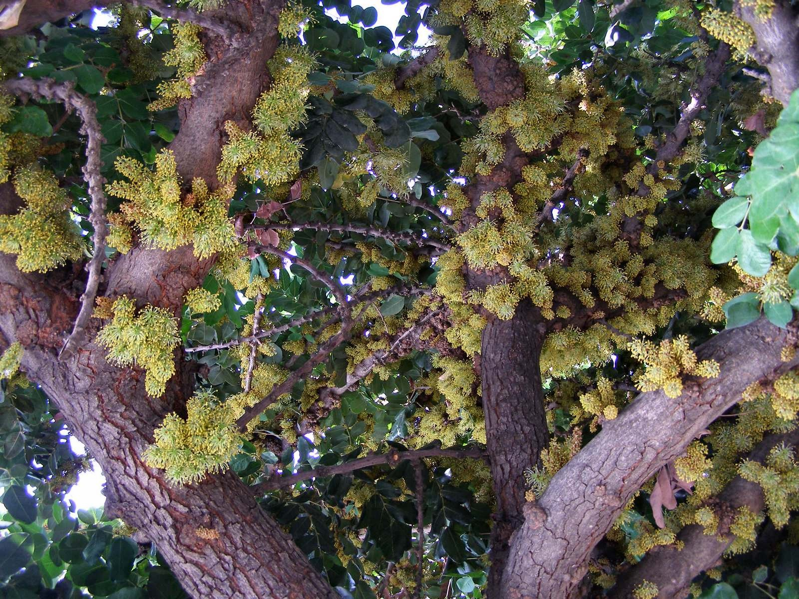 Blühender Johannisbrotbaum, Kreta